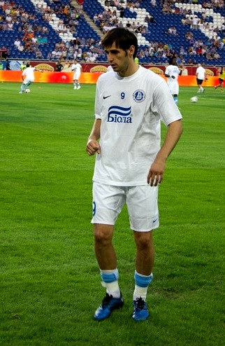 Фото сделано перед матчем Днепр - Шахтер